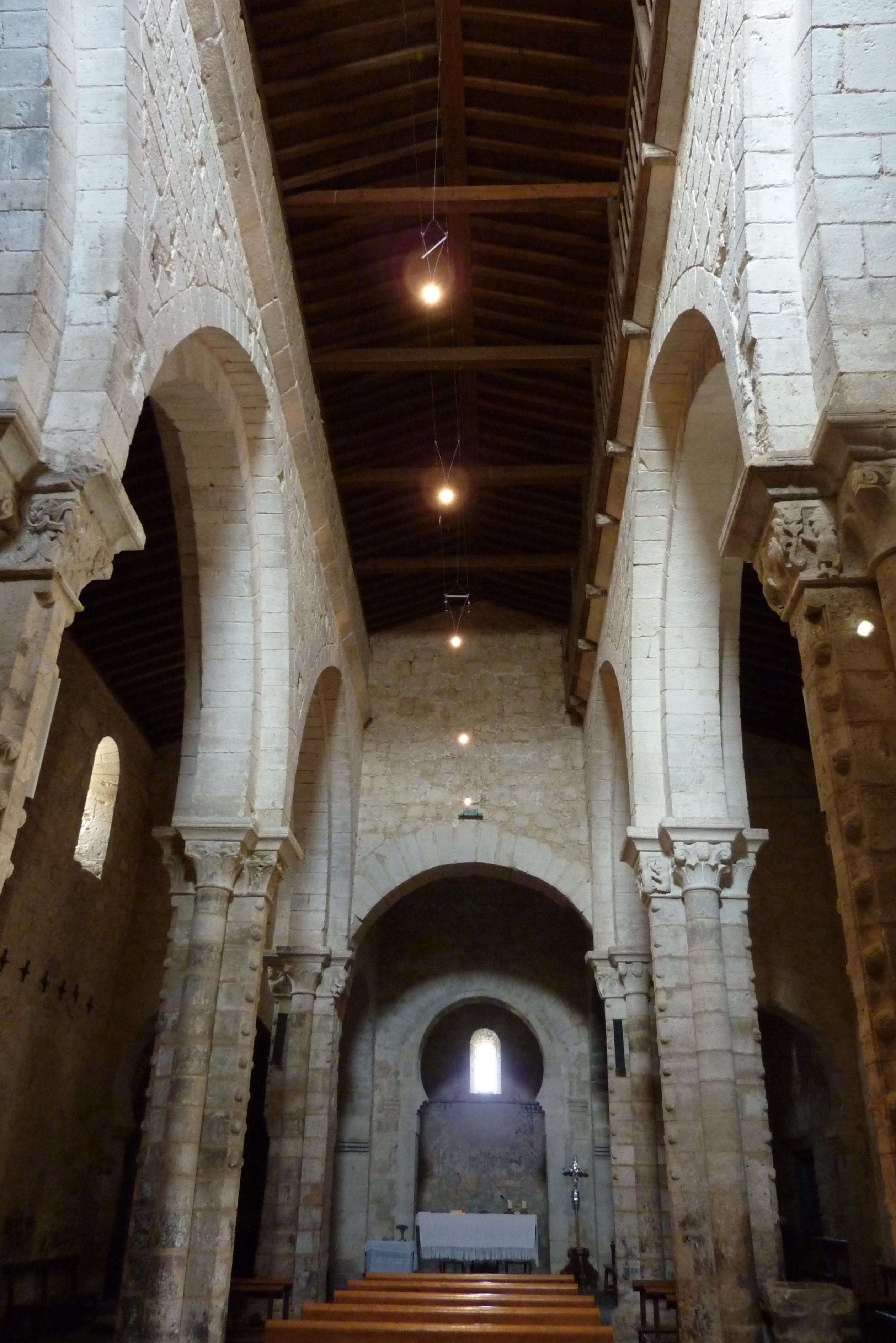 Santa María de Wamba, Innenansicht, Langhaus und Apsis